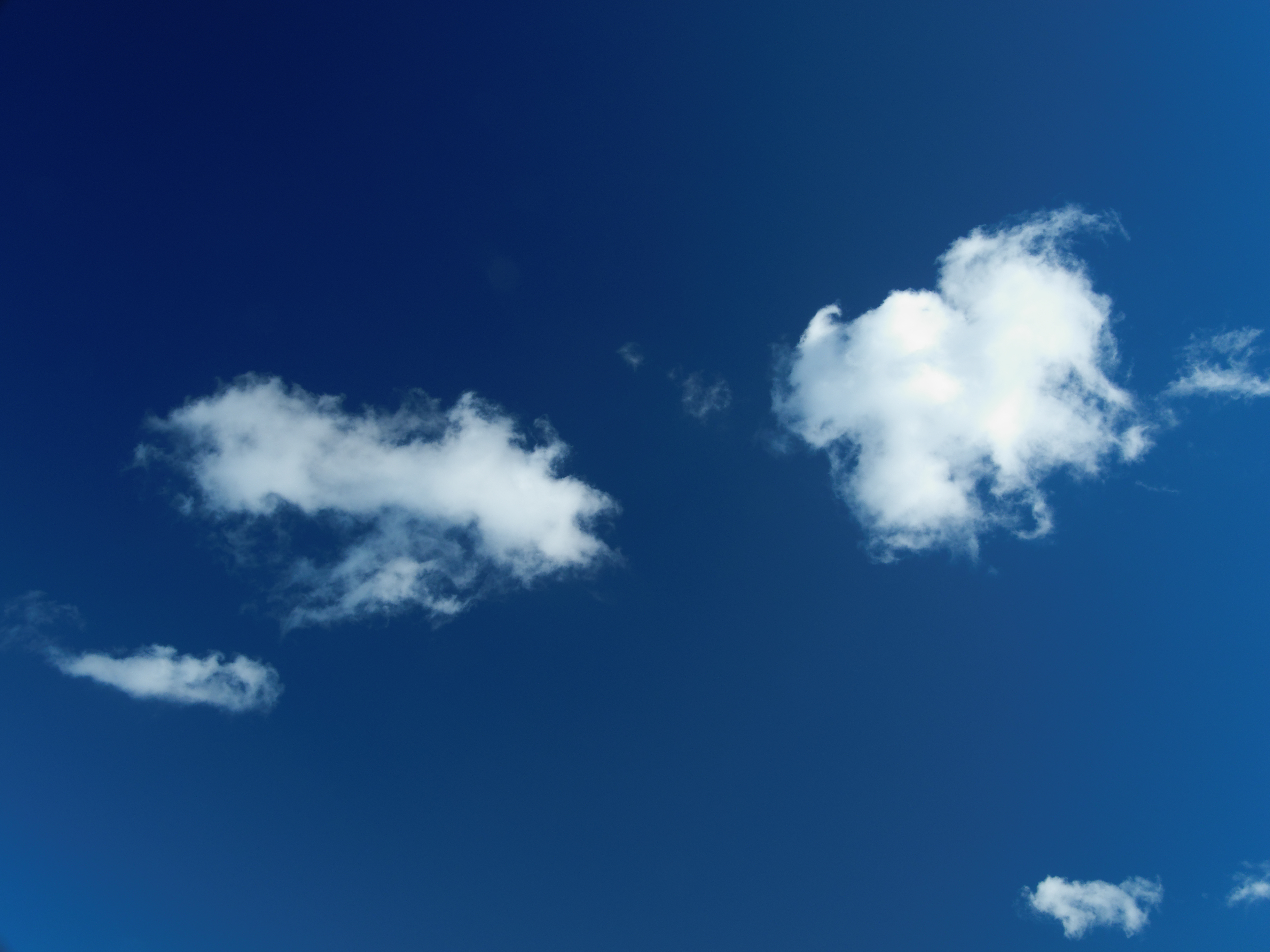 Nuages. Photo réalisée avec un filtre polarisant.